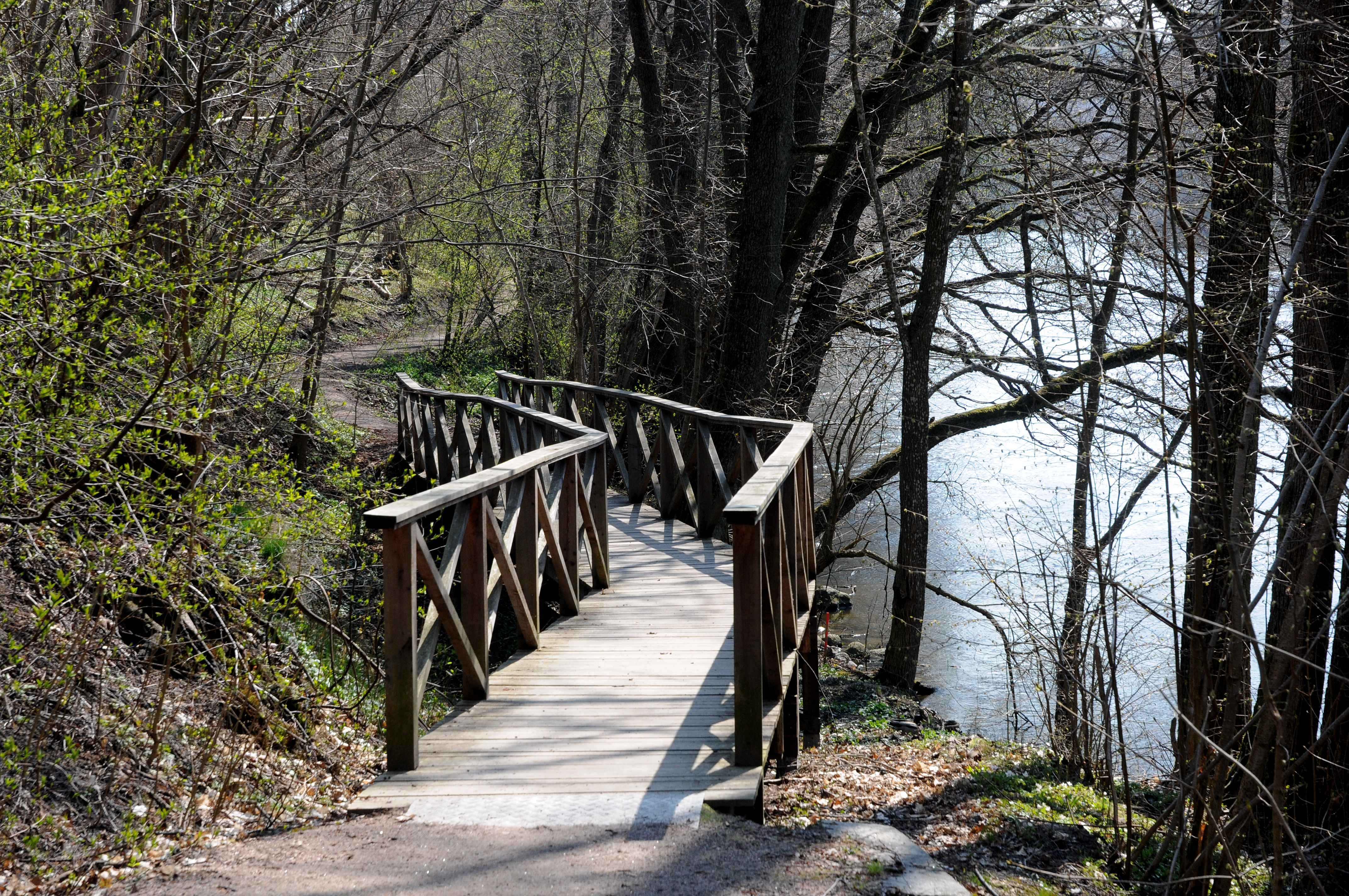 Hållet-Marieberg-Stenbro naturreservat i Nyköpings kommun